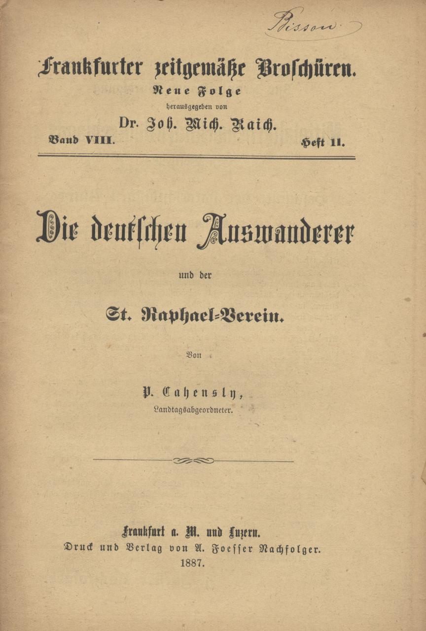 Peter Paul Cahensly (1838-1923), Unternehmer und Reichstagsabgeordneter, Zentrum, Titelblatt einer Broschüre